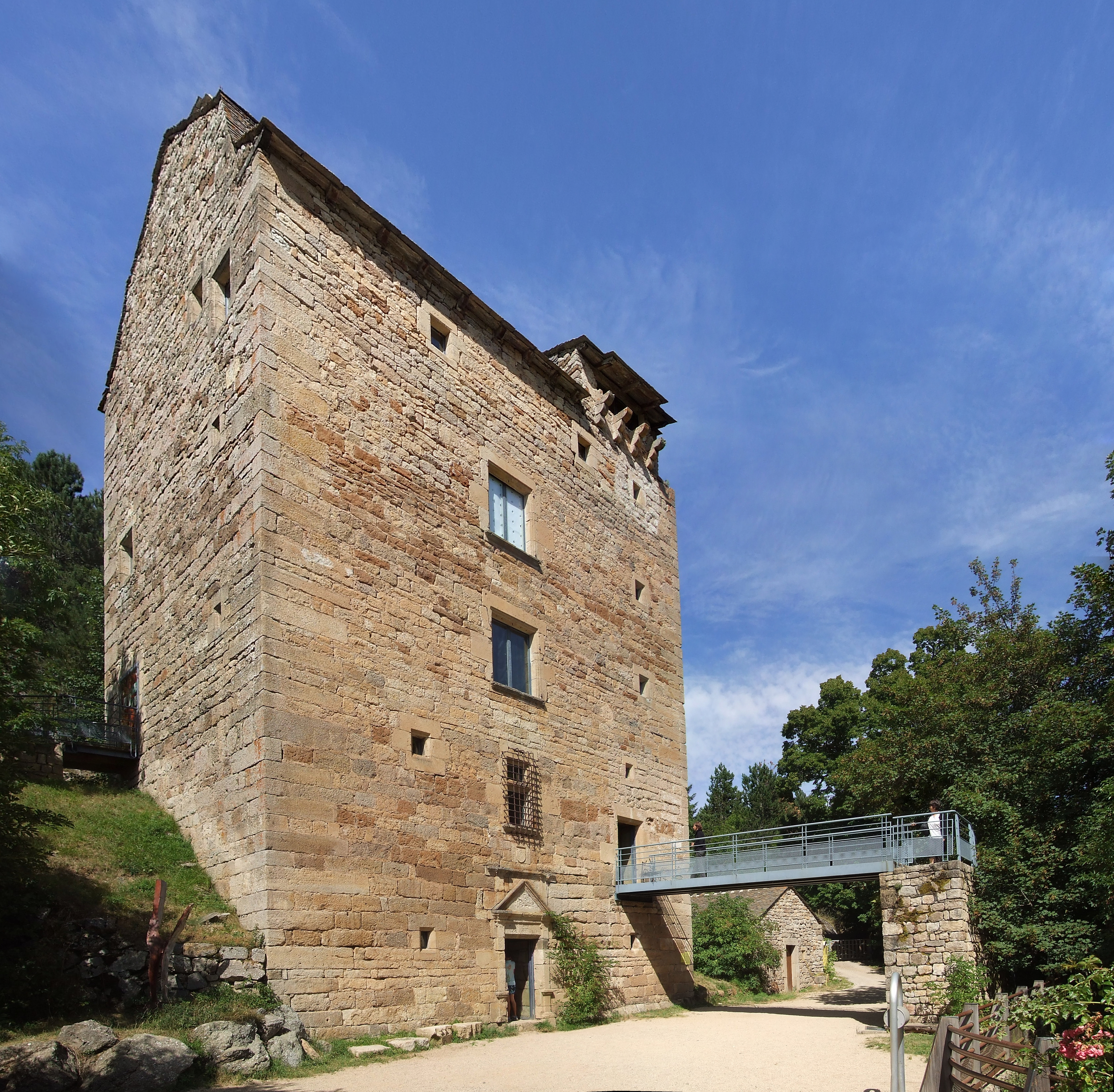 Tour du Villaret - Allenc - Lozère